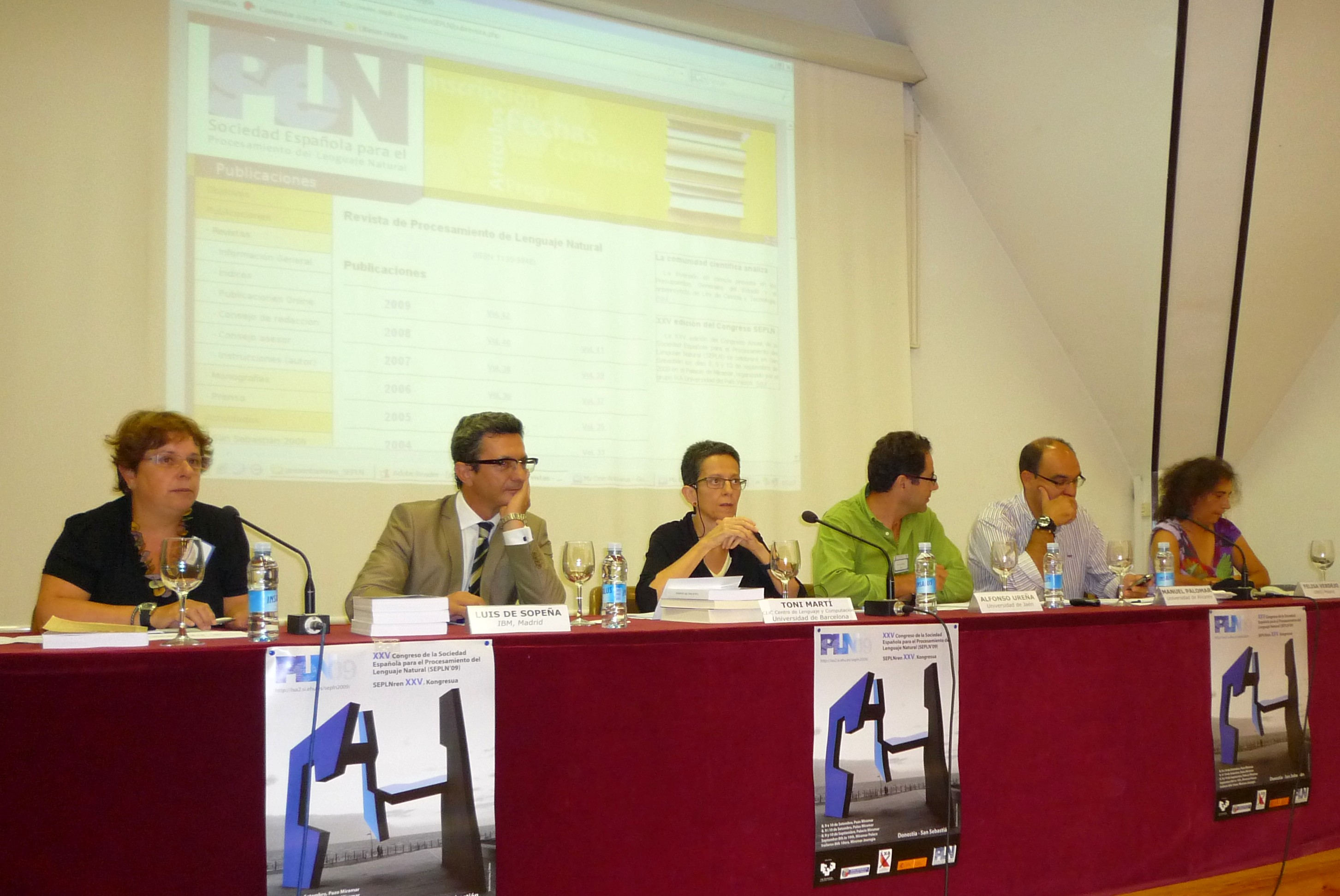 Presidentes y presidentas de la asociación SEPLN en 2009